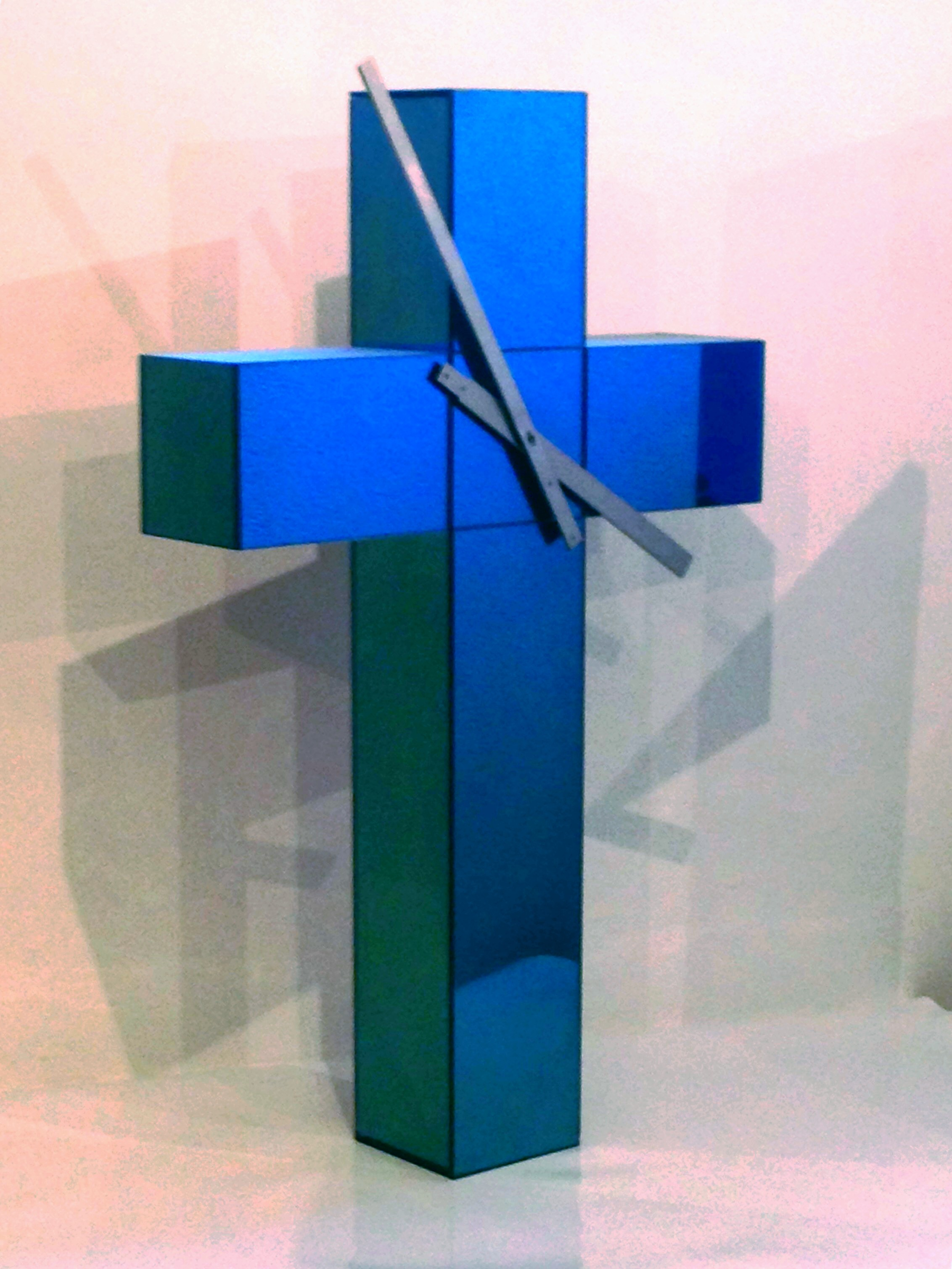 Scupture